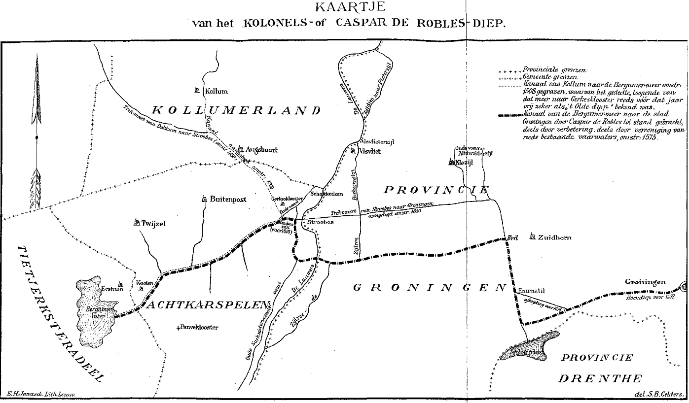 Kaartje van het Kolonels- of Caspar de Robles-diep